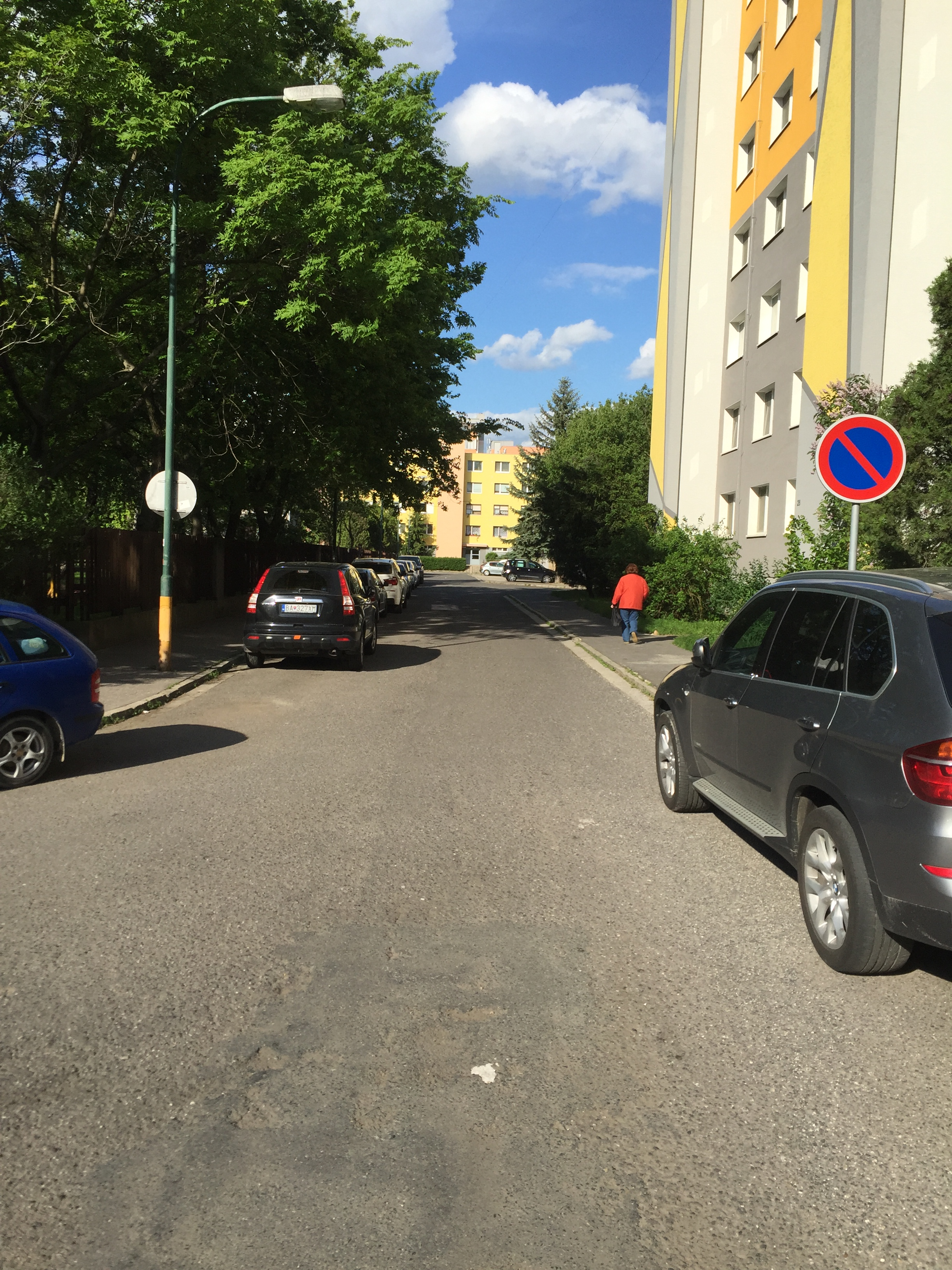 Toplianska, Vrakuňa, Bratislava